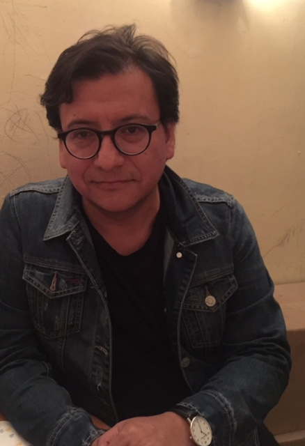 Valderrama, Miguel. Historiador